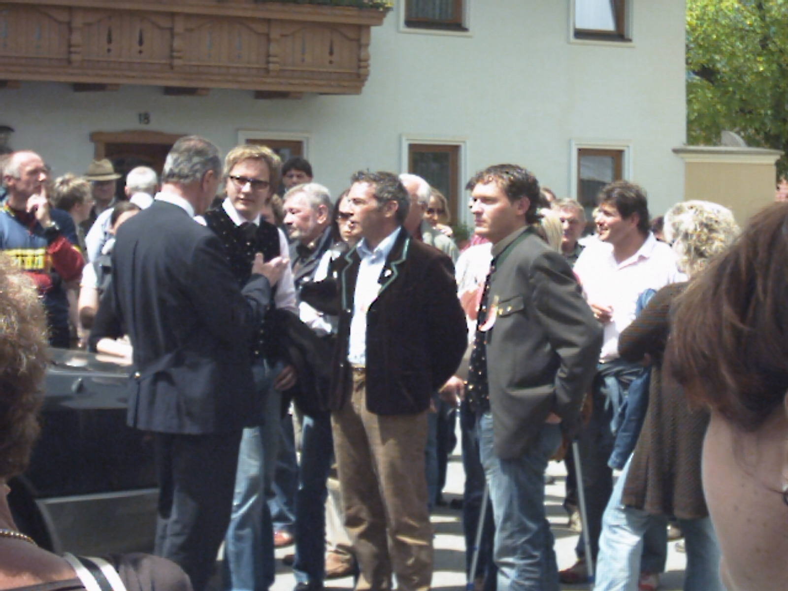 Besucher beim Kufenstechen in Feistritz/Gailtal (2006)